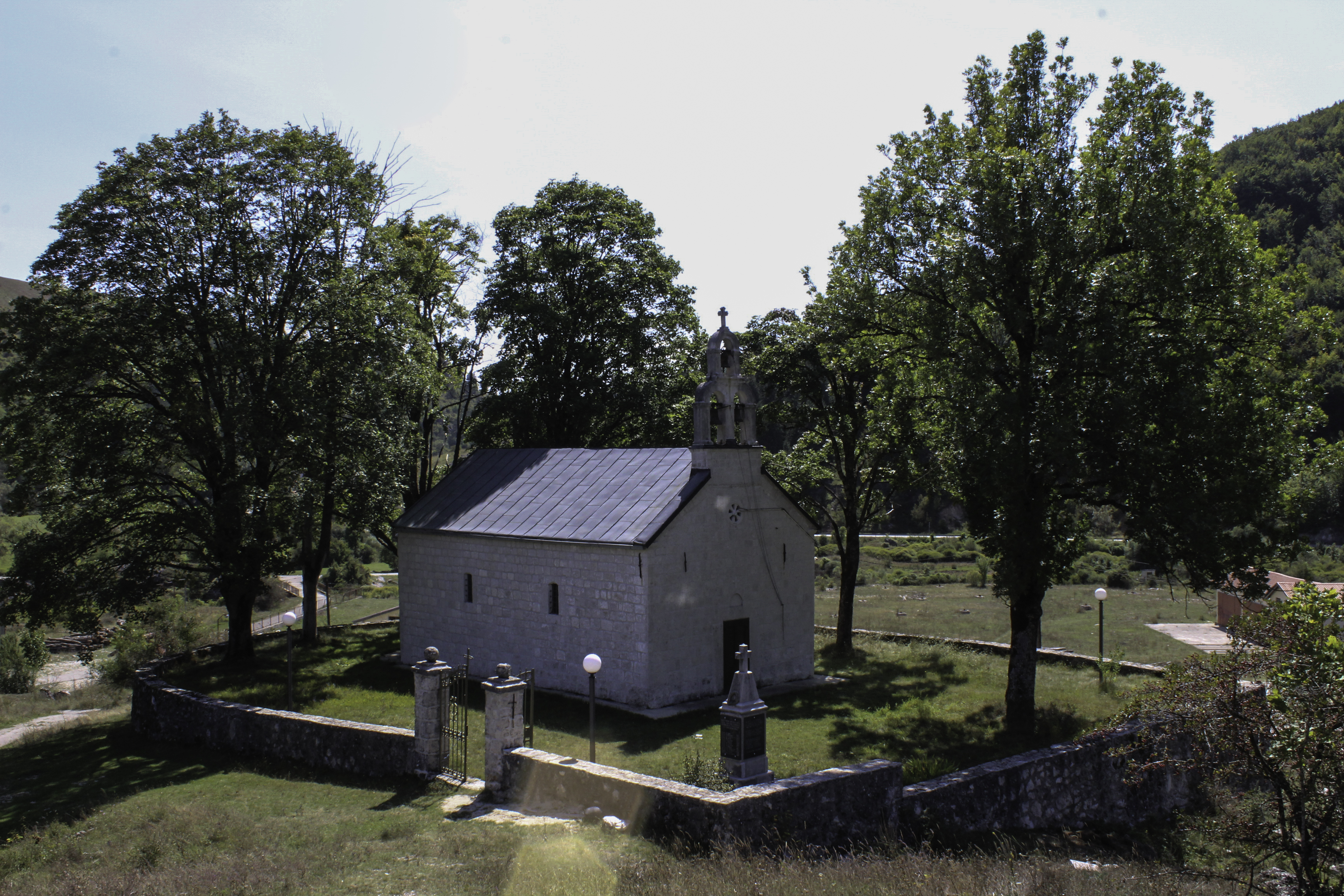 Српски (ћирилица): This image was uploaded as part of Trace of Soul 2018. Црква Вазнесења Христовог - Фојница (Гацко).